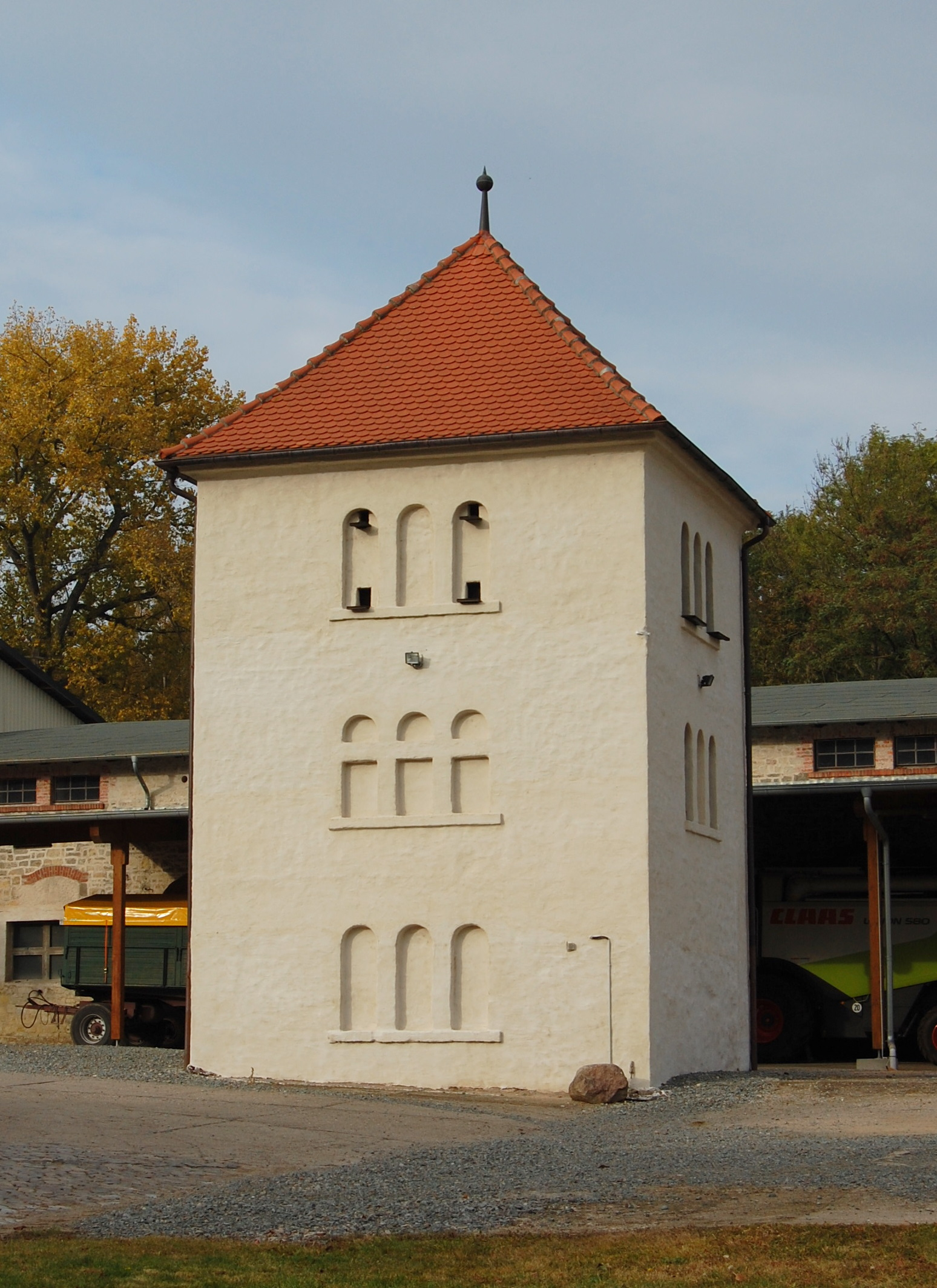 Taubenturm auf dem Hof der Komturei Bergen